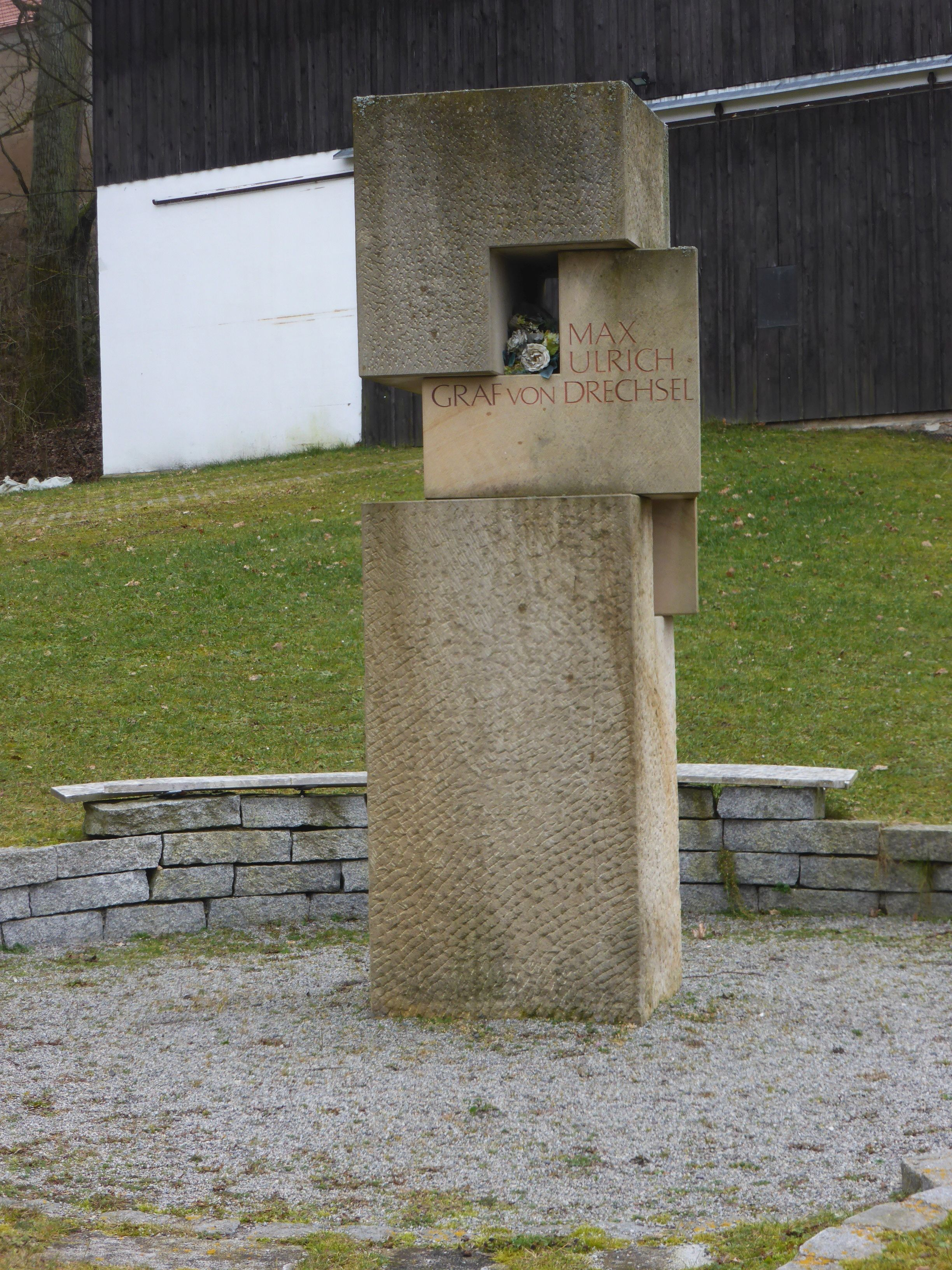 Schloss Karlstein (Regenstauf) - Denkmal für Maximilian von Drechsel